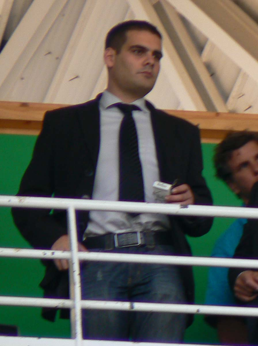 Le journaliste sportif de France Télévision Mathieu Lartot au stade Marcel Michelin de Clermont-Ferrand lors de la permière journée de Coupe d'Europe opposant l'ASM Clermont Auvergne aux Saracens